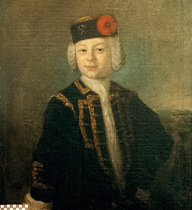 Erbprinz Friedrich Albrecht in Bergmannstracht